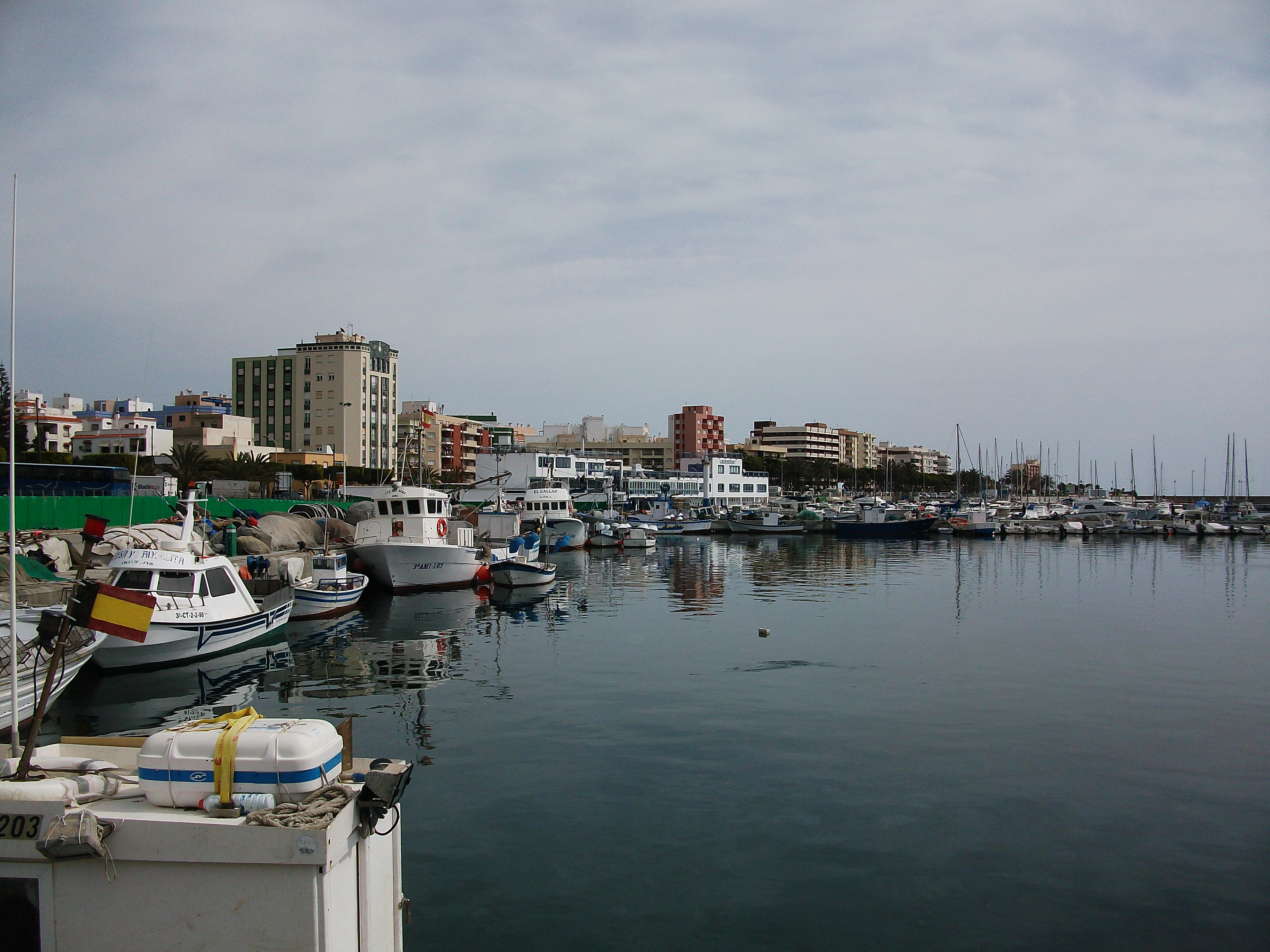 Adra. Imagen del puerto